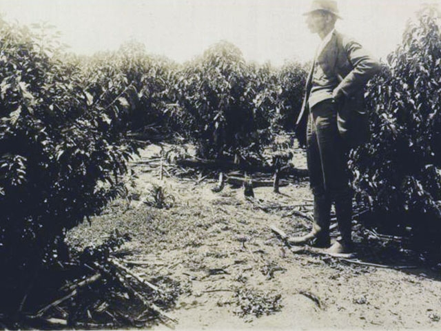 Carlos Leôncio de Magalhães verificando uma de suas plantações